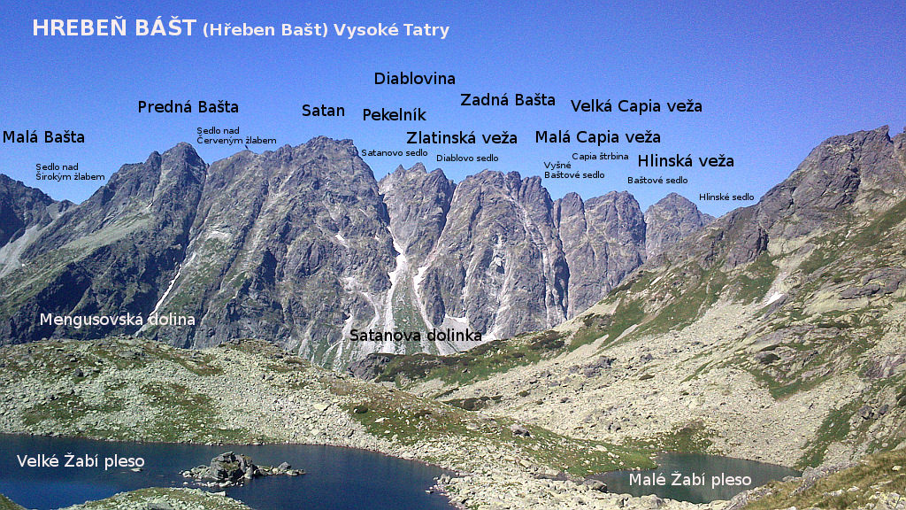 Baštový hřeben (Hrebeň Bášt) ve Vysokých Tatrách nad Mengusovskou dolinou.